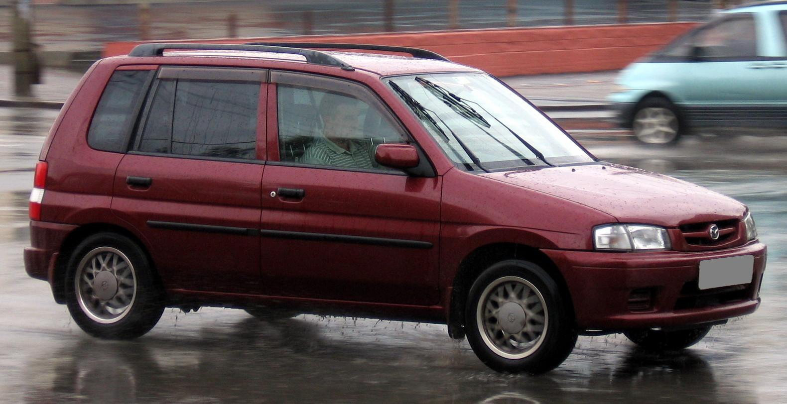 Photo taken in Tomsk, Russia